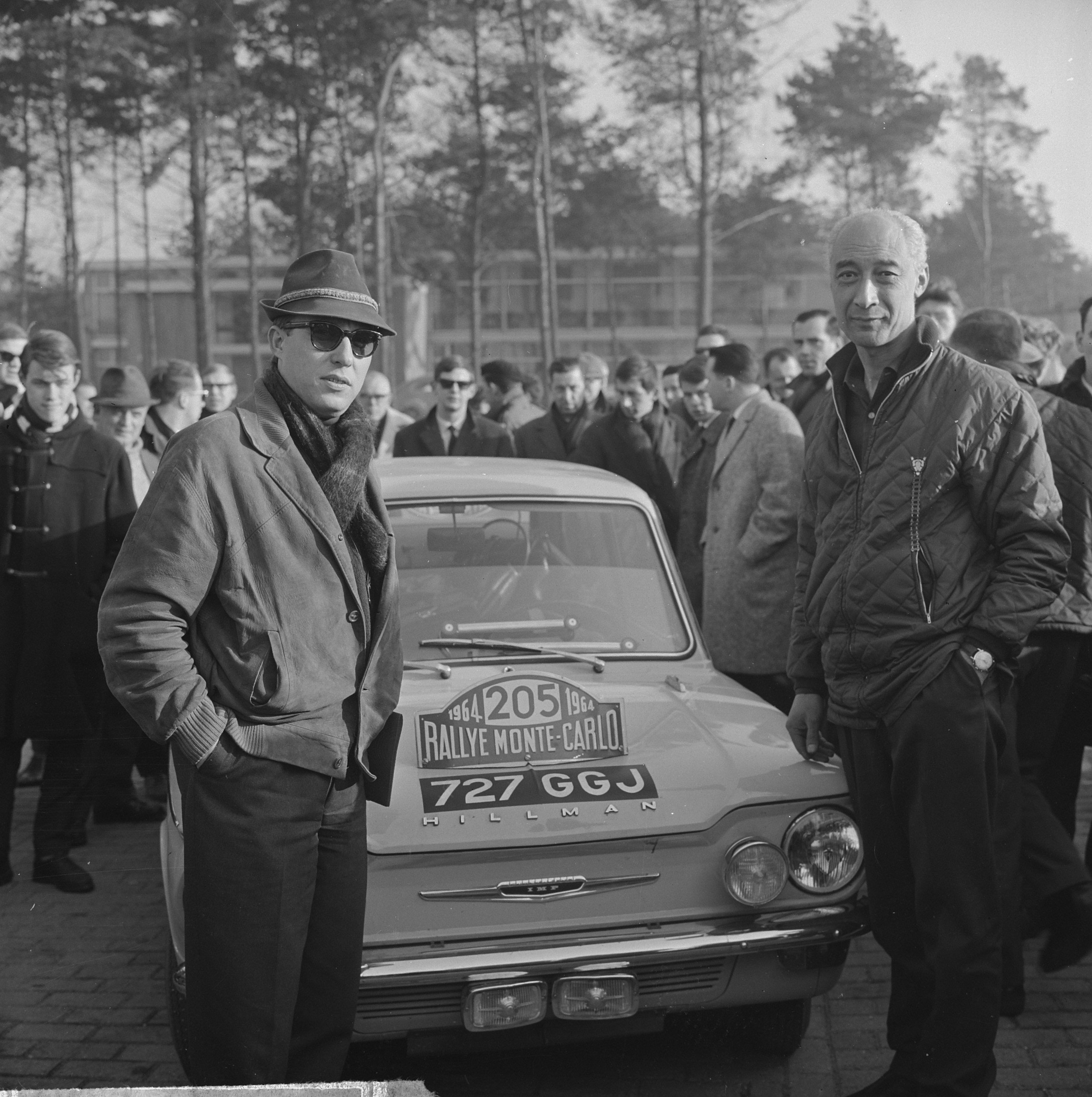 Collectie / Archief : Fotocollectie Anefo Reportage / Serie : [ onbekend ] Beschrijving : Rally de Monte Carlo , de Hollanders M. Gatsonides (r) en A. Ilsken bij controlepost Datum : 19 januari 1964 Trefwoorden : Rallys, controleposten Persoonsnaam : A. Ilsken, Gatsonides, M. Instellingsnaam : Rally Monte Carlo Fotograaf : Koch, Eric / Anefo Auteursrechthebbende : Nationaal Archief Materiaalsoort : Negatief (zwart/wit) Nummer archiefinventaris : bekijk toegang 2.24.01.03 Bestanddeelnummer : 915-9593